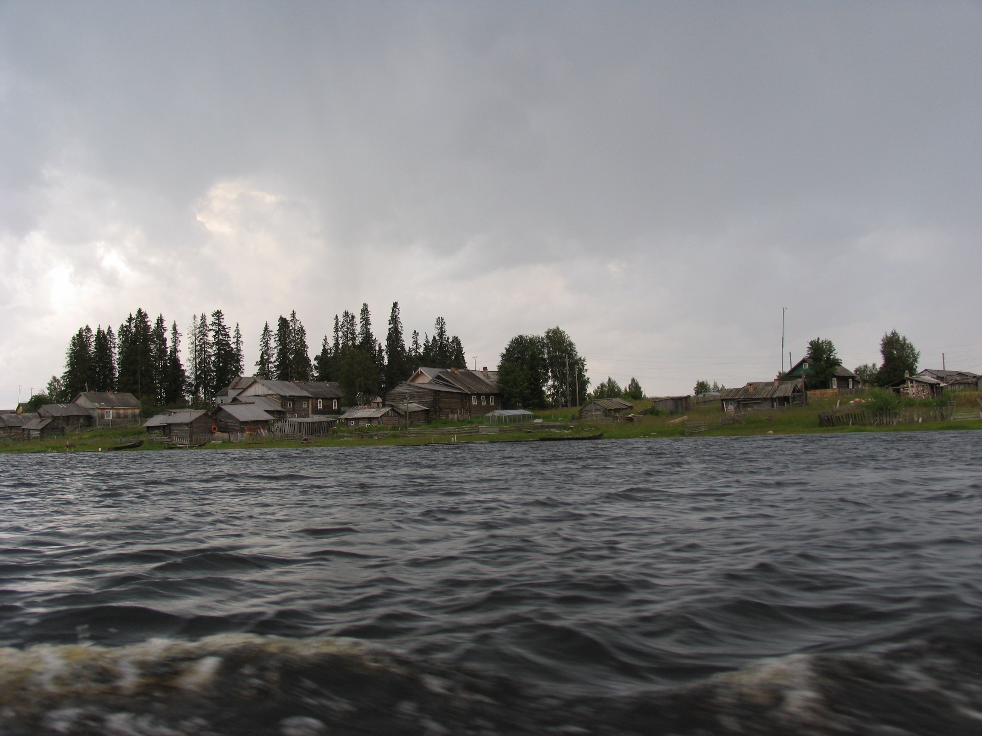 Paanajärvi village in Karelia, Russia